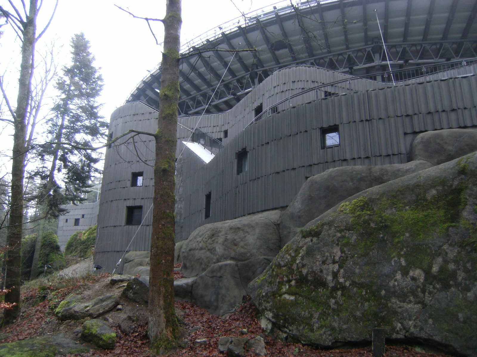 Luisenburgfestspiele- Bühnenhaus nach dem großen Umbau 2010-2013